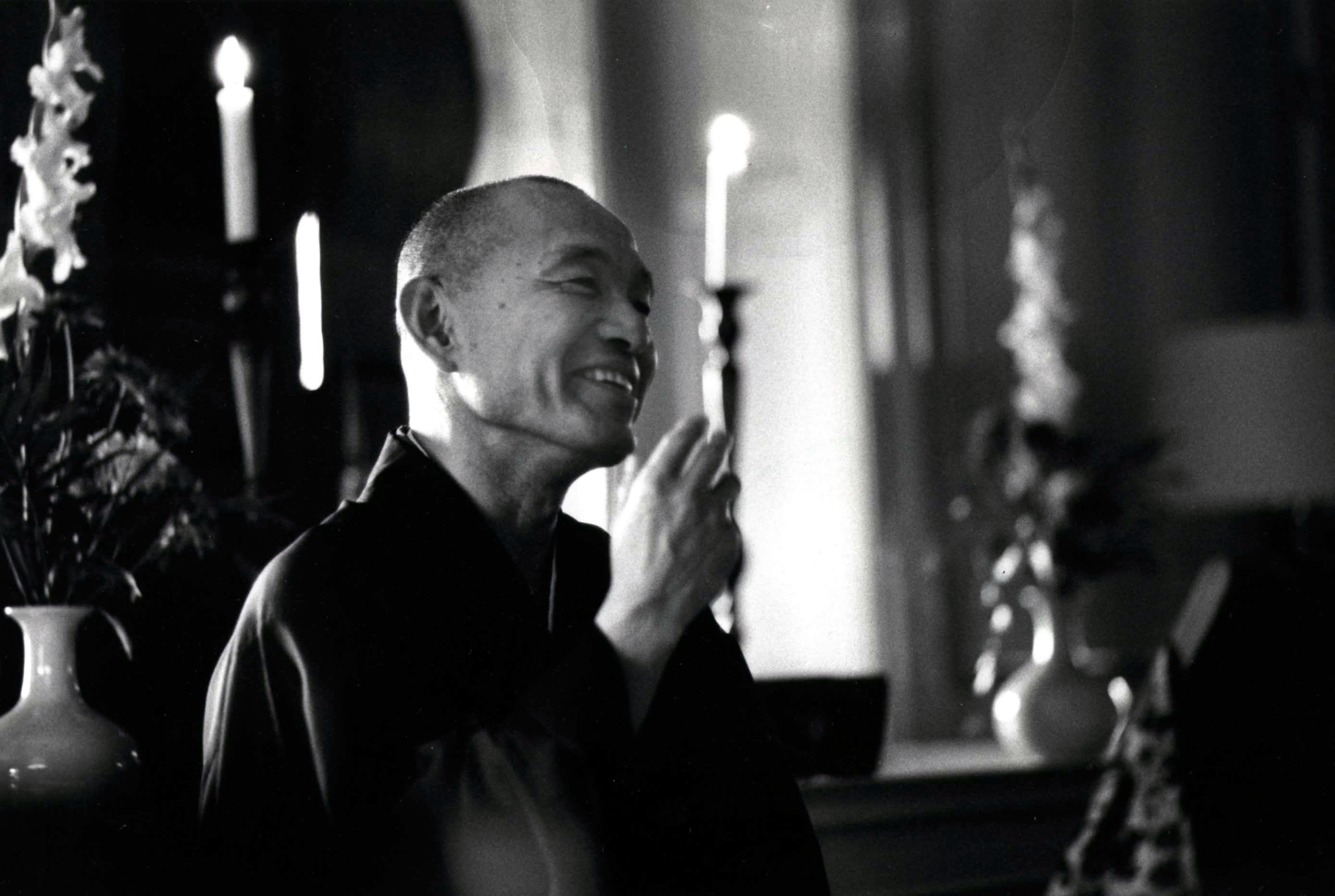 Taizan Maezumi